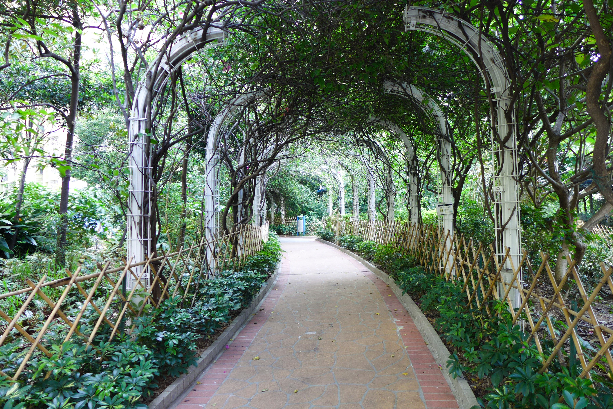 Un Chau Estate Landscape Garden shelter